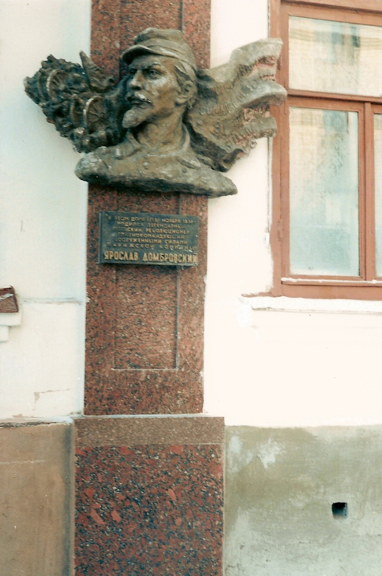 Dambrovski Jaroslav, Kuenstler Josef Tabachnyk